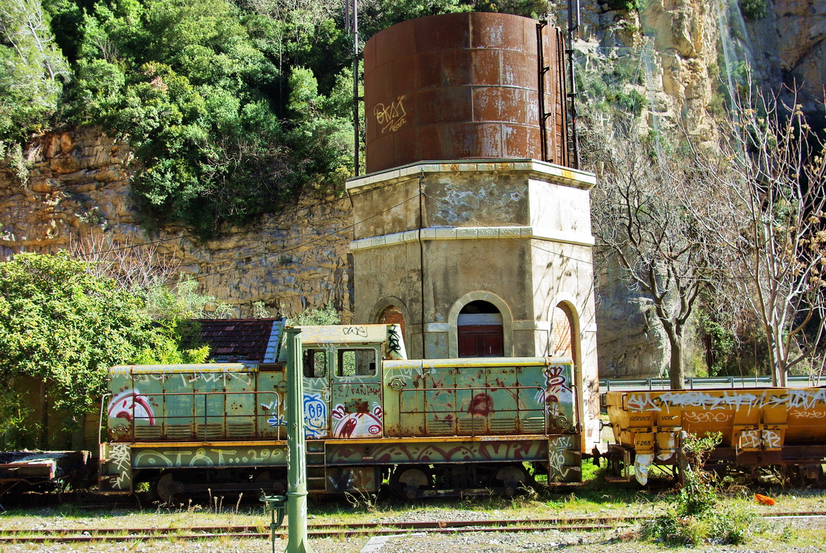 Le locotracteur BB401 désaffecté en Gare de la Tinée